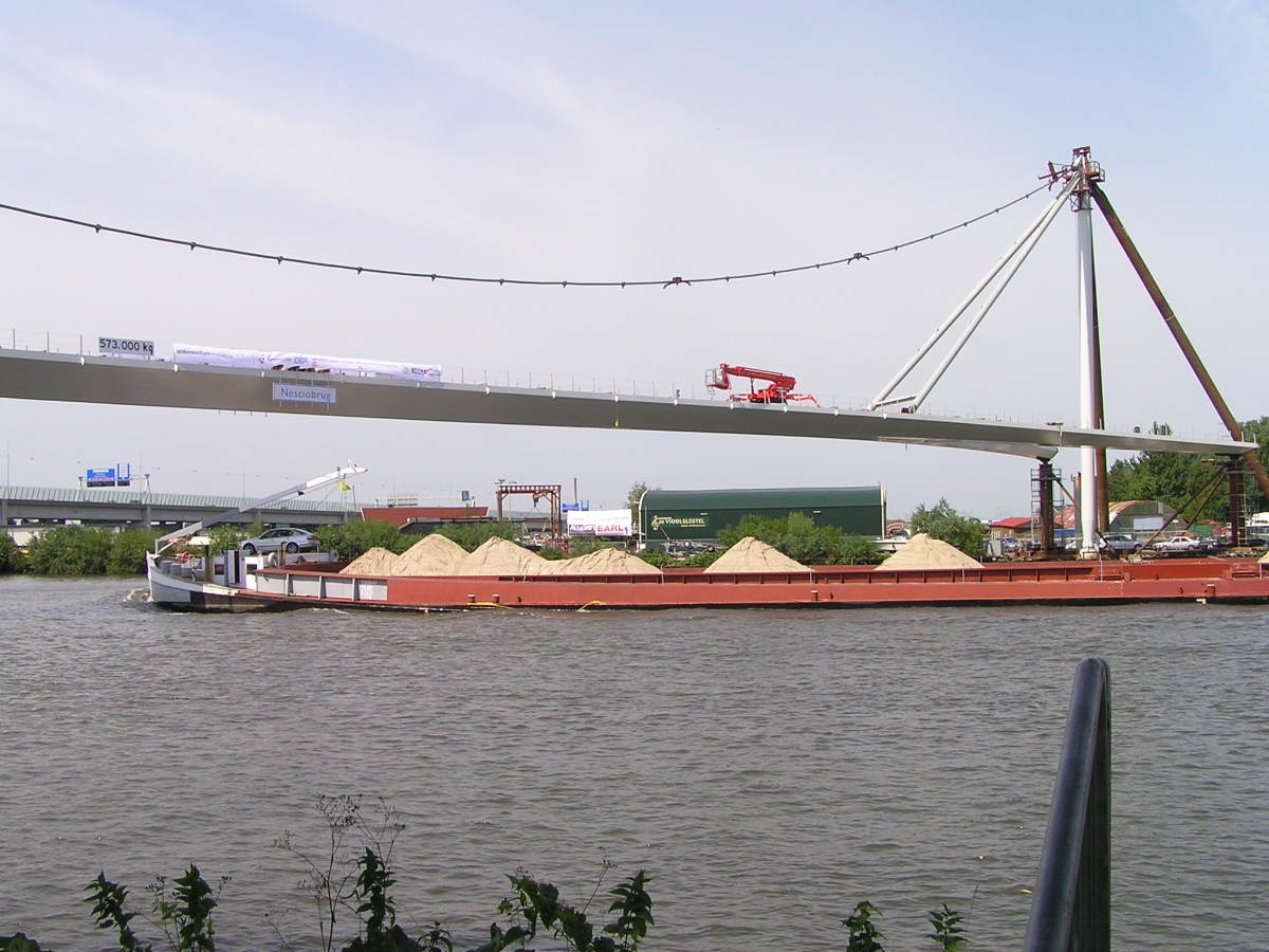 De Nesciobrug gaat over het Amsterdam-Rijnkanaal en verbindt Amsterdam/Diemen met de Diemerzeedijk, die is opgeknapt tot park en bij IJburg hoort. De brug, bedoeld voor fietsers en voetgangers is een ontwerp van Jim Eyre van het bureau WilkinsonEyre. In de Amsterdamse nummering is het brug 2013. Het is de eerste hangtuibrug in Nederland. Waarschijnlijk wordt de Nesciobrug eind 2005 in gebruik genomen.